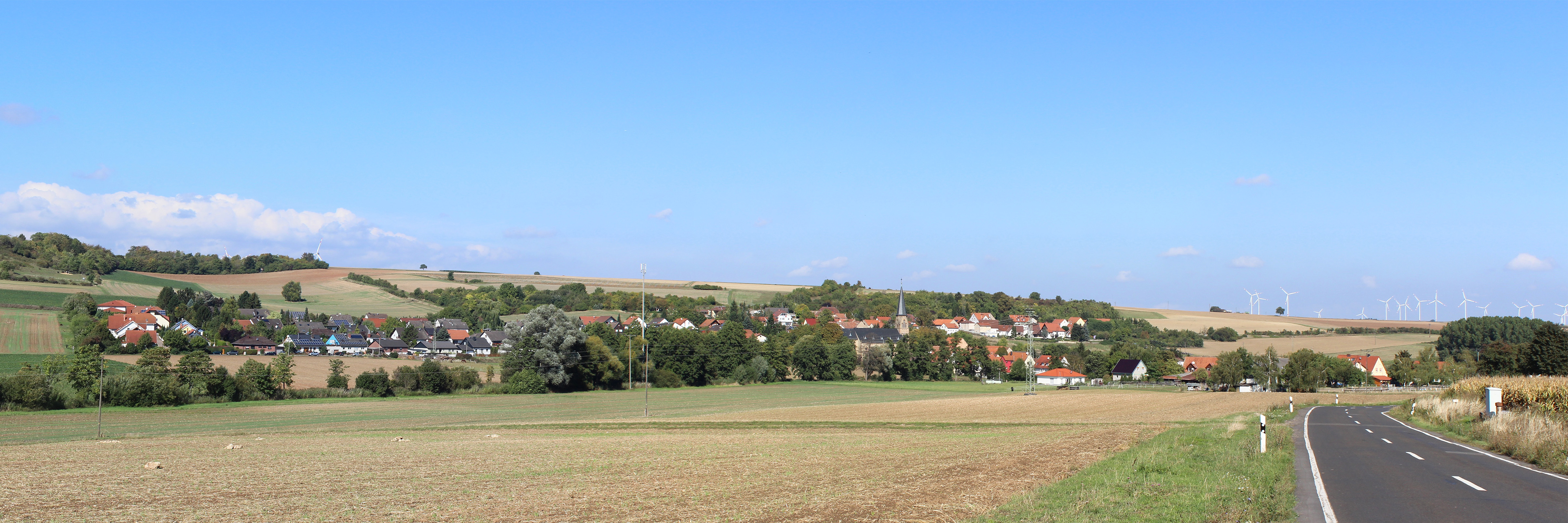 Panorama von Ottersheim von Süden, aus Richtung Biedesheim her gesehen.